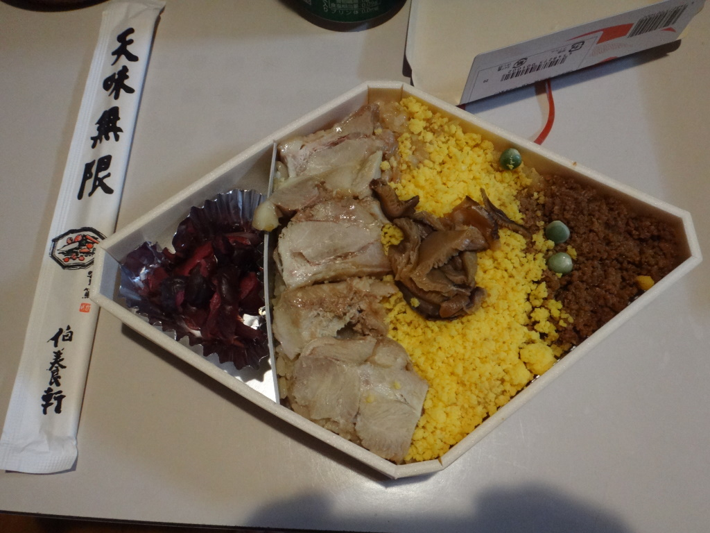 野辺地とりめし（野辺地駅の駅弁）の内容